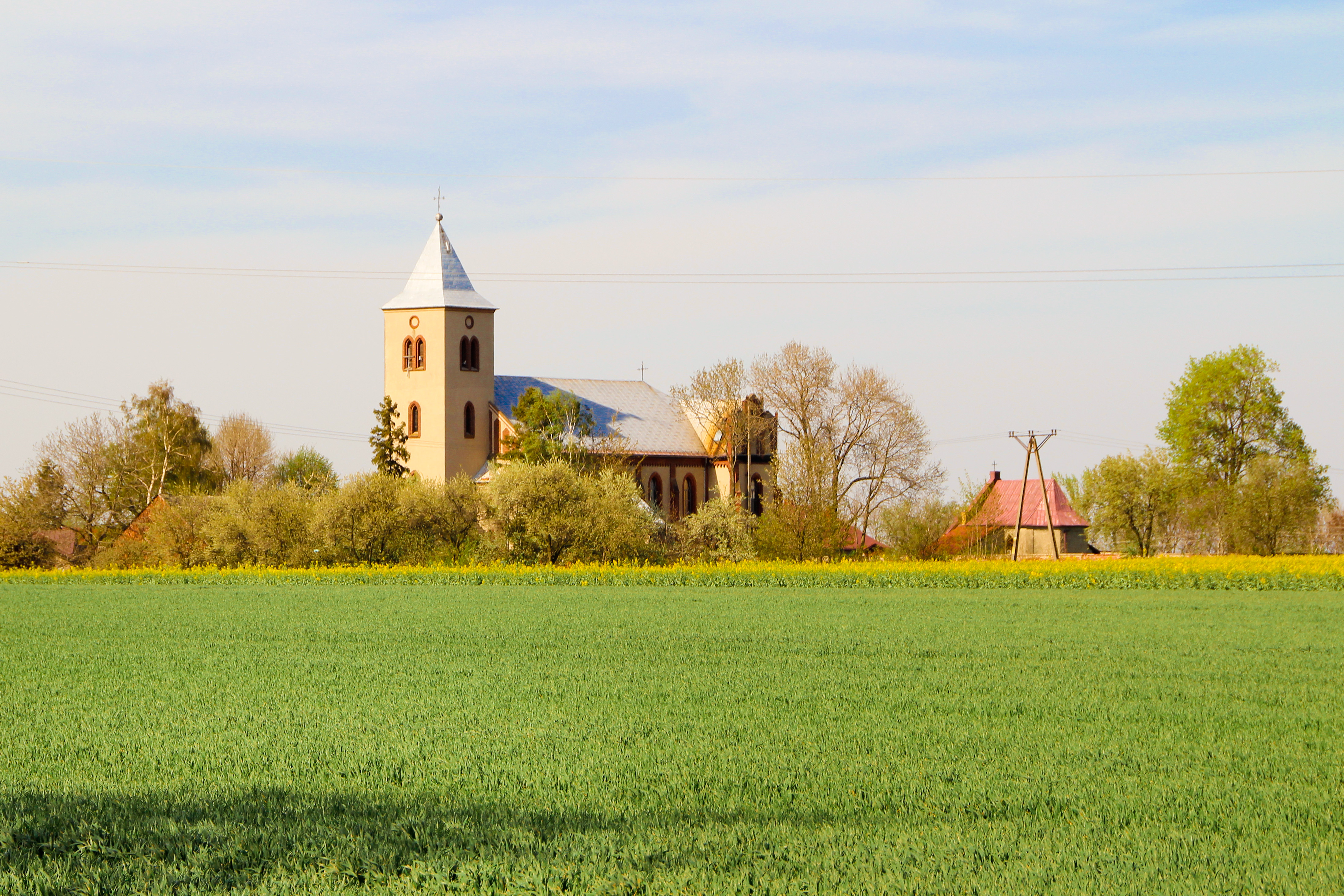 Nasiedle – wieś w Polsce położona w województwie opolskim, w powiecie głubczyckim, w gminie Branice.